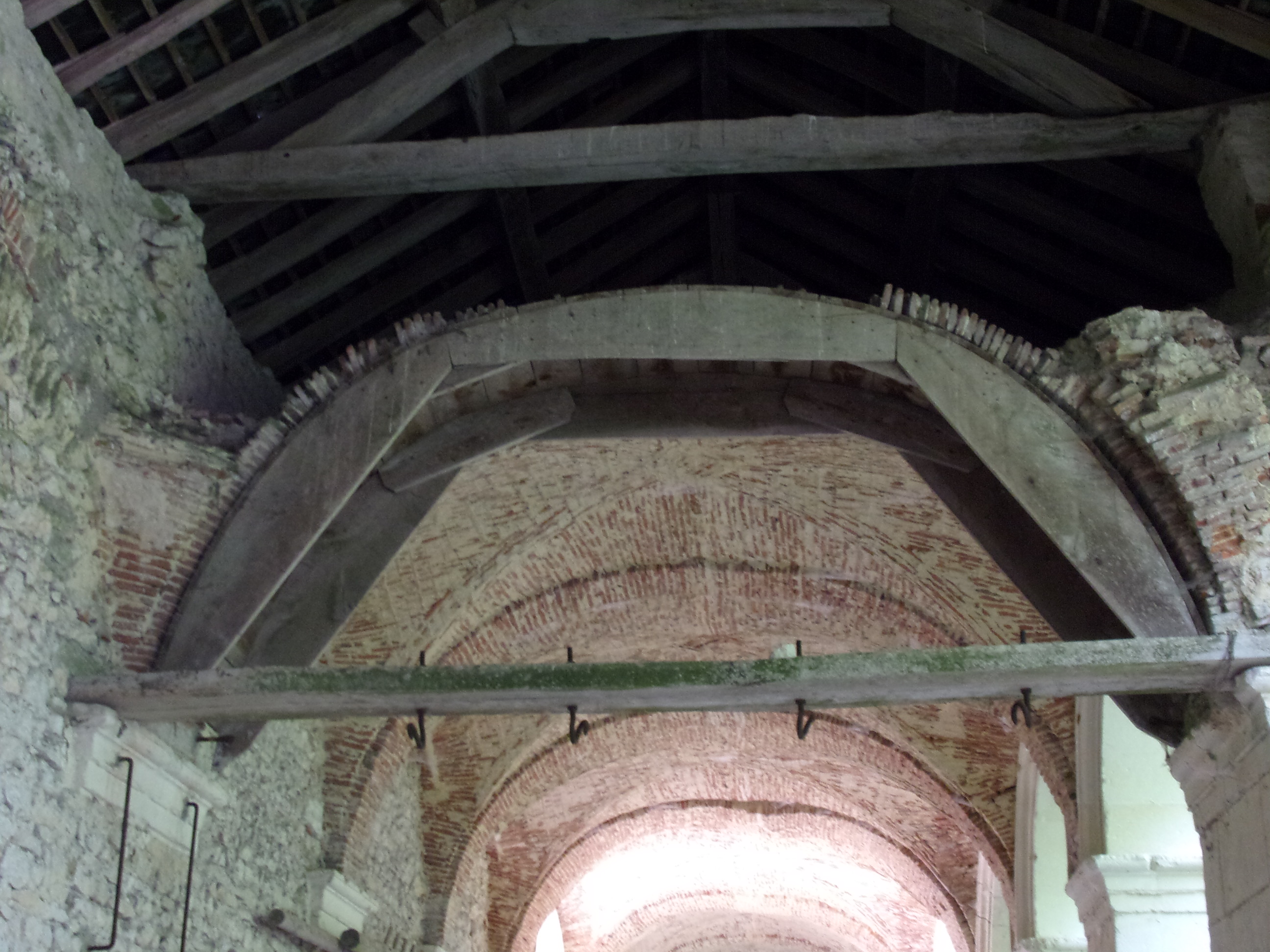 Cintre ayant permis la construction des voûtes du cloître